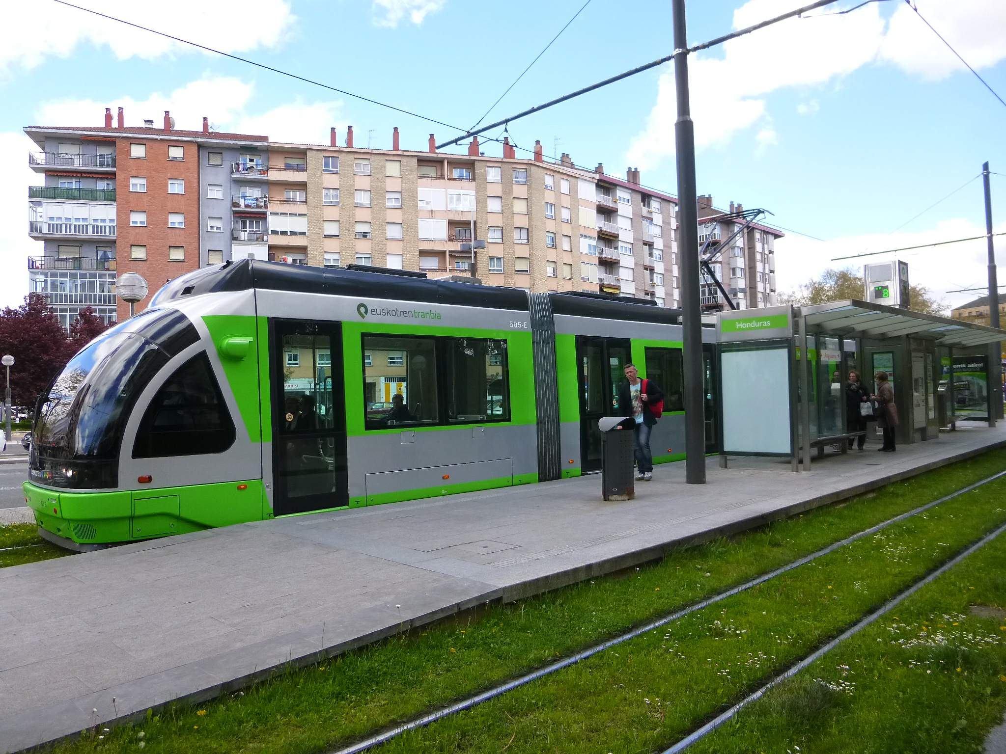 Vitoria - Calle Honduras